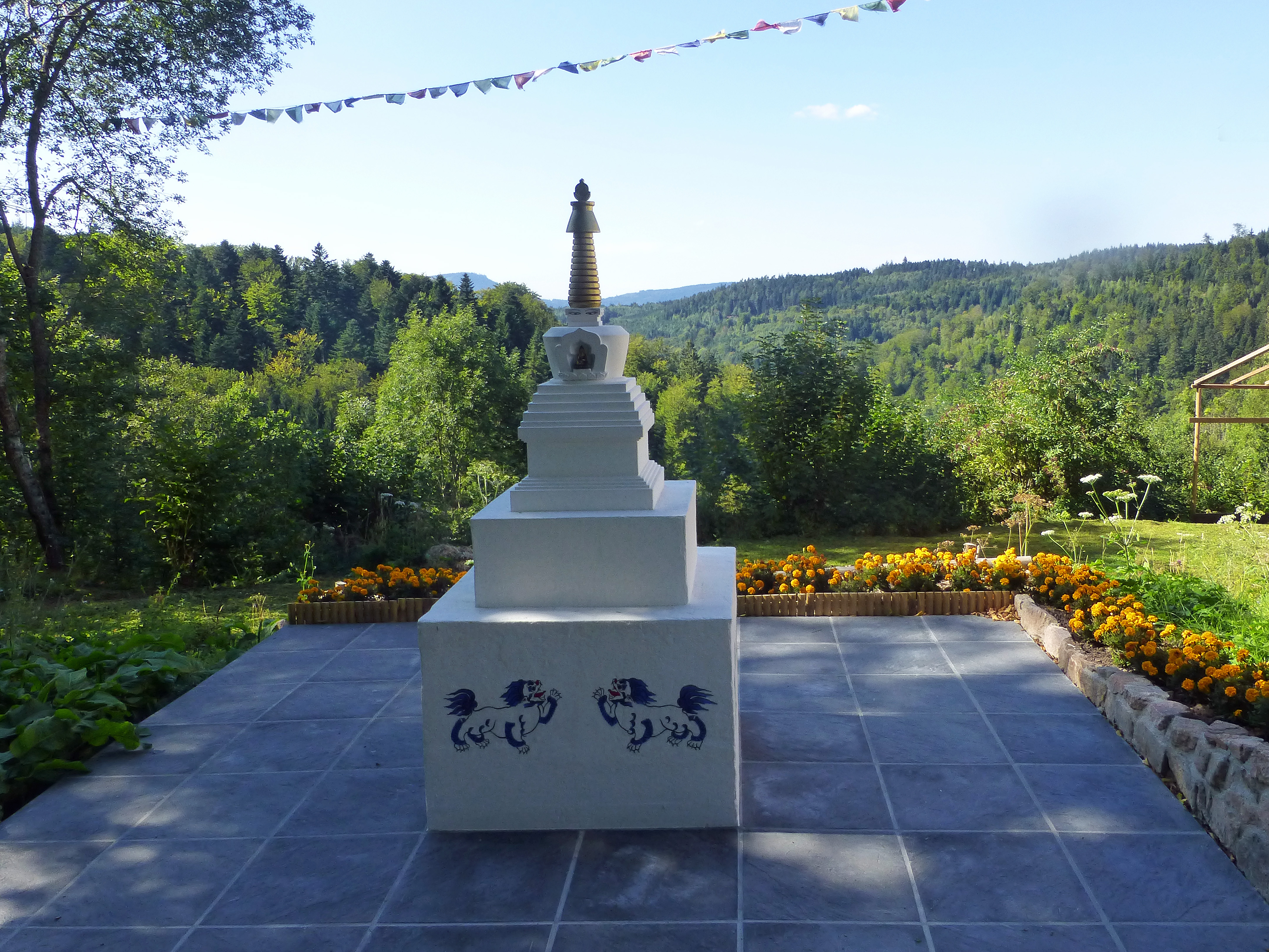 Stupa du centre bouddhiste tibétain (Bodhicharya-France) de Lusse, au lieu-dit La Bouille des Trois-Maisons (Vosges).